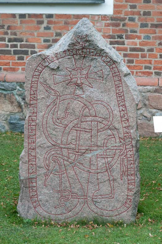 RAÄ-nummer Tensta 90:1. Inskriften lyder: "Torbjörn och Torsten och Styrbjörn läto resa stenen efter Torfast, sin fader. Öpir ristade". Runstenen står rest på kyrkogården några meter söder om kyrkan. Motiv: U1034 Tensta kyrka Nyckelord: Riksintressen, Runor Kategori: Runristning/runsten RAÄ-nummer Tensta 90:1. Inskriften lyder: "Torbjörn och Torsten och Styrbjörn läto resa stenen efter Torfast, sin fader. Öpir ristade". Runstenen står rest på kyrkogården några meter söder om kyrkan.